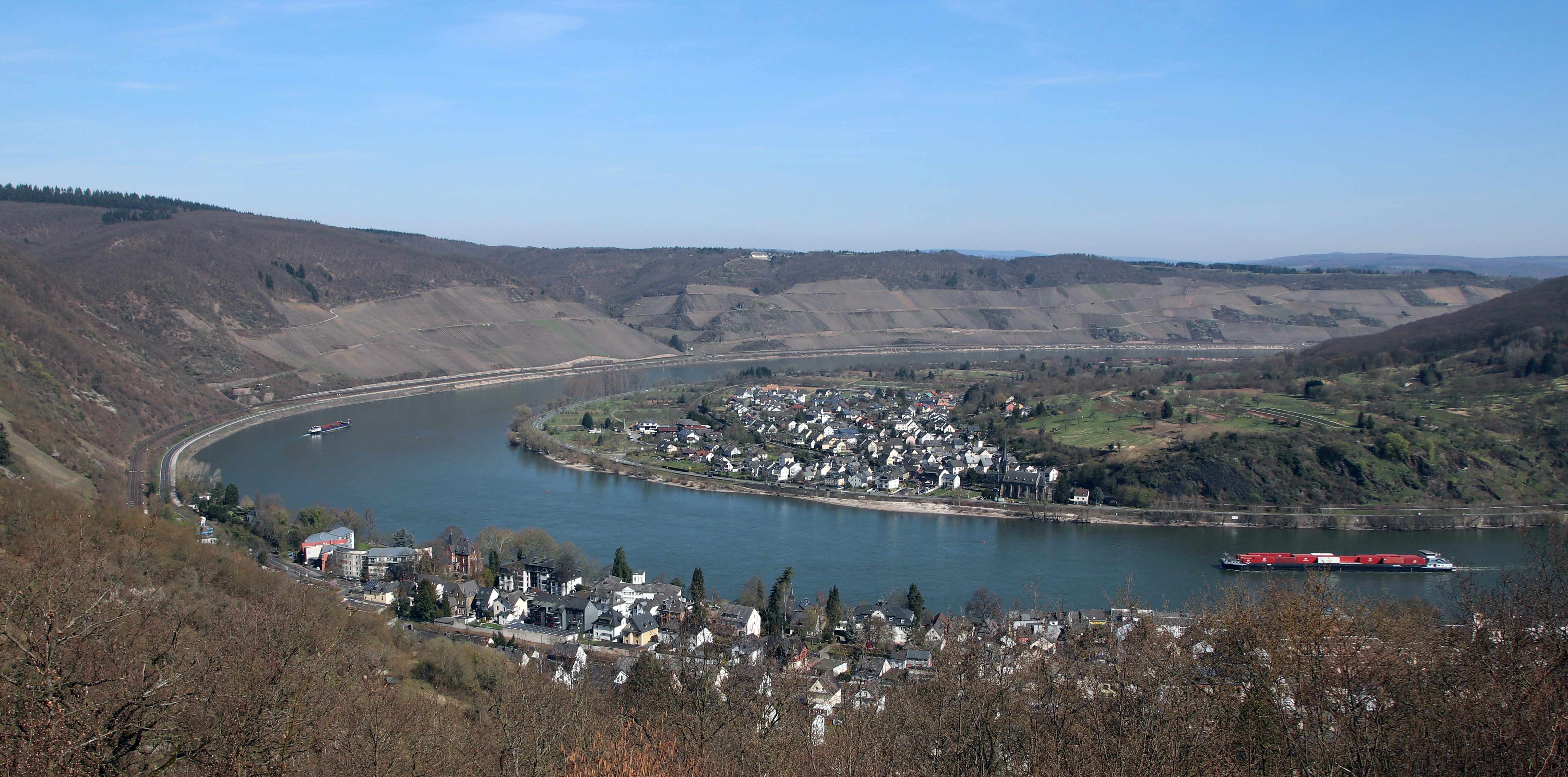 Blick auf das in der Rheinschleife gelegene Filsen, im Vordergrund Ausläufer von Boppard. Aufgenommen vom Wanderweg "Elfenlay".